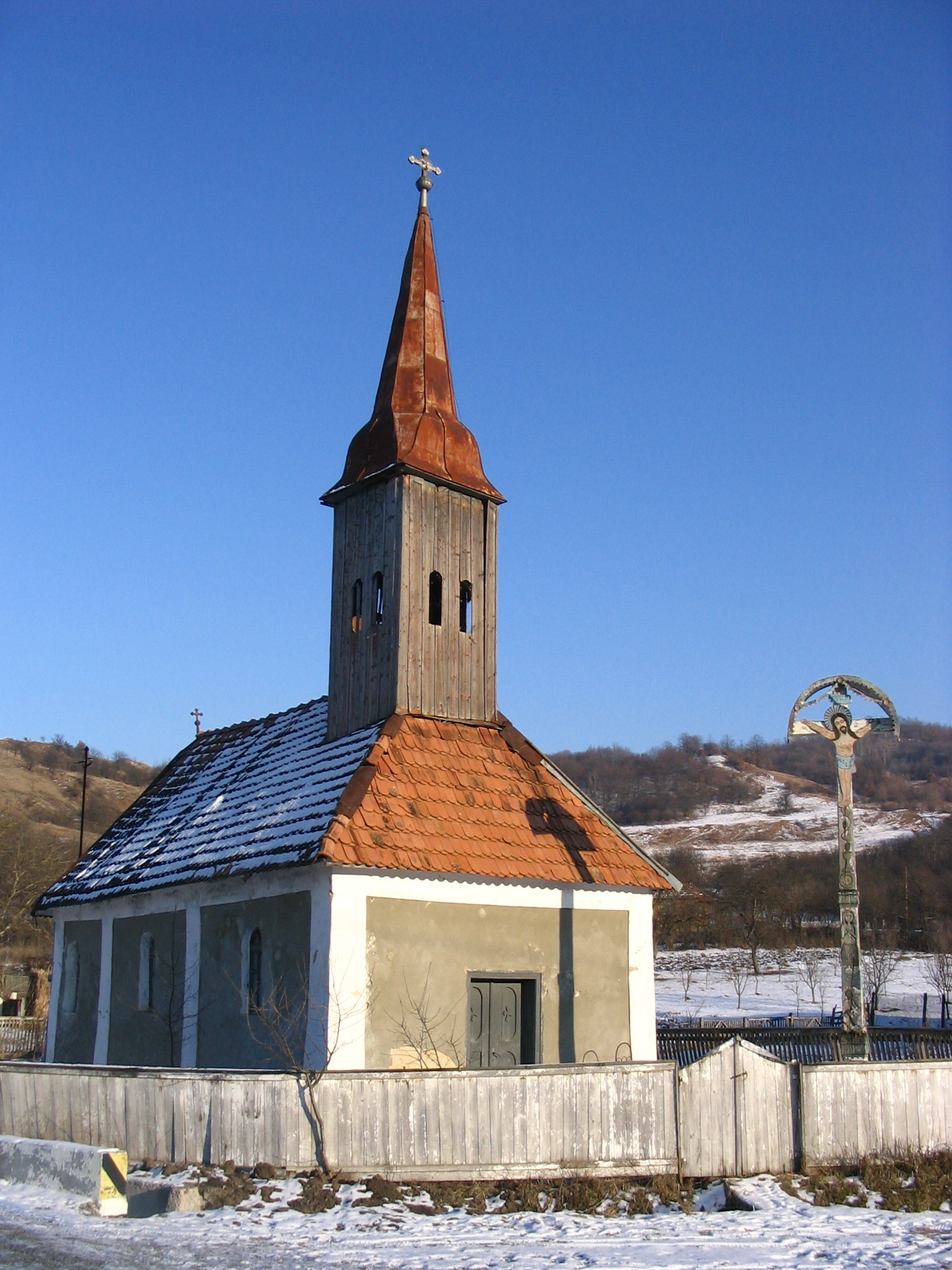 Biserica din Stoboru, judeţul Sălaj. Autor: Bogdan Ilieş Data: ianuarie 2006